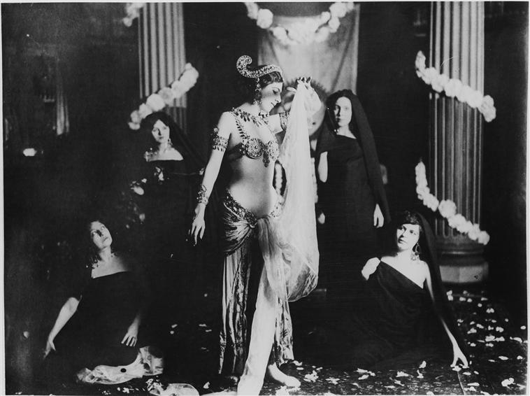 Mata Hari, Paris, Museum Guimet